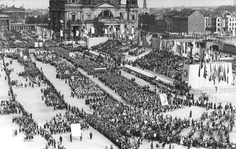 Berlin, III. Weltfestspiele, Festumzug Zentralbild Schä-12.8.1951 Die große Demonstration der jungen Friedenskämpfer Deutschlands zu den III.Weltfestspielen in Berlin am 12.8.1951. UBz: Blick auf den Marx-Engels-Platz während der großen Demonstration.